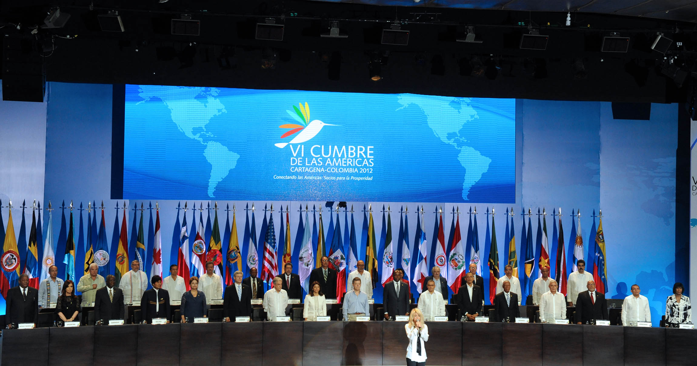 Shakira entona el himno colombiano en el inicio de la Cumbre de las Américas en Cartagena, Colombia.